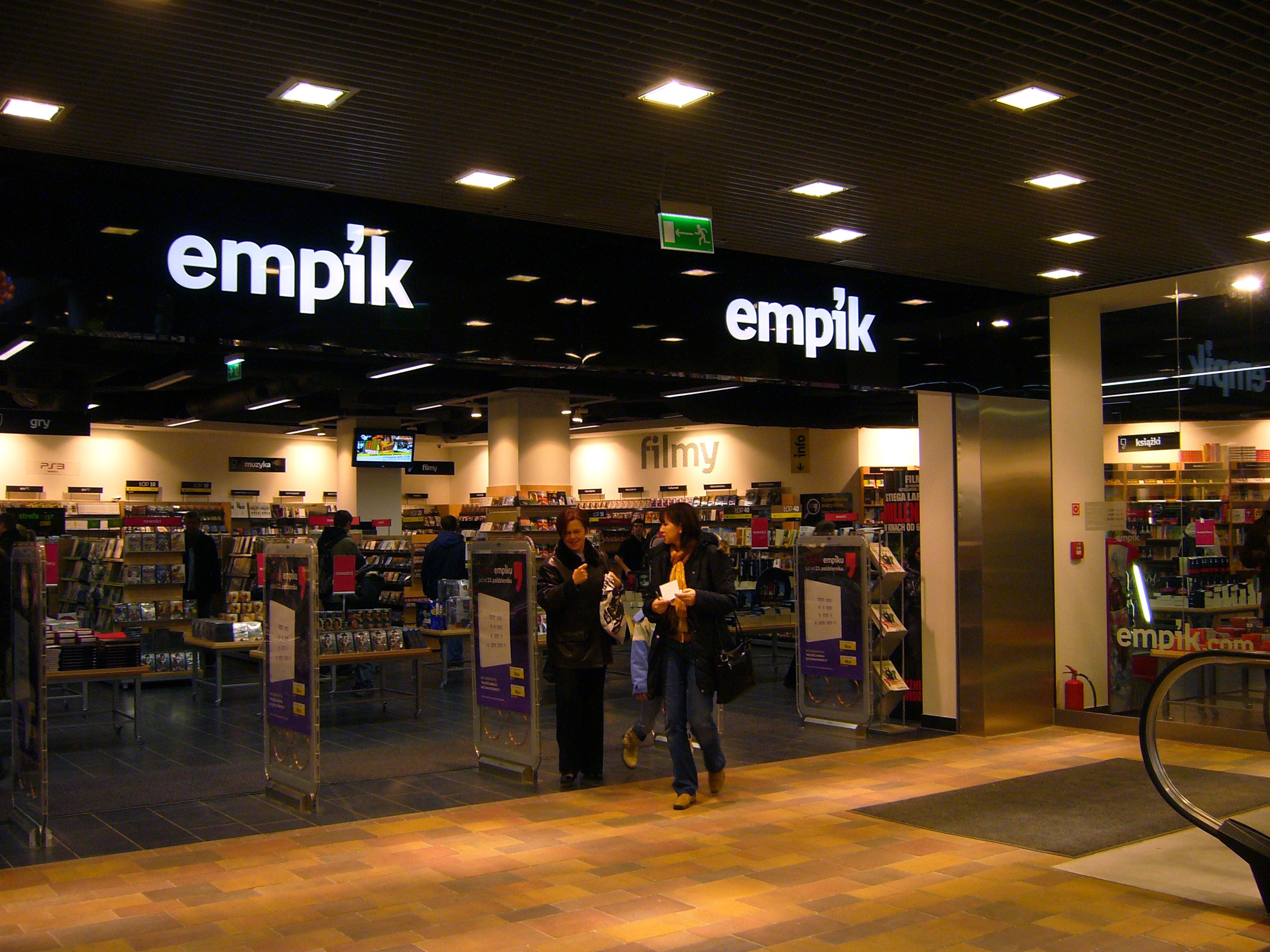 Knihkupectví EMPIK v Galerii Sfera v Bílsku-Bělé.